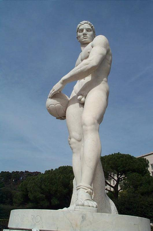 Vittorio Godigna (Foro Italico)